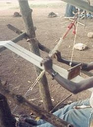 Métier à tisser traditionnel du nord de la Cote d'Ivoire